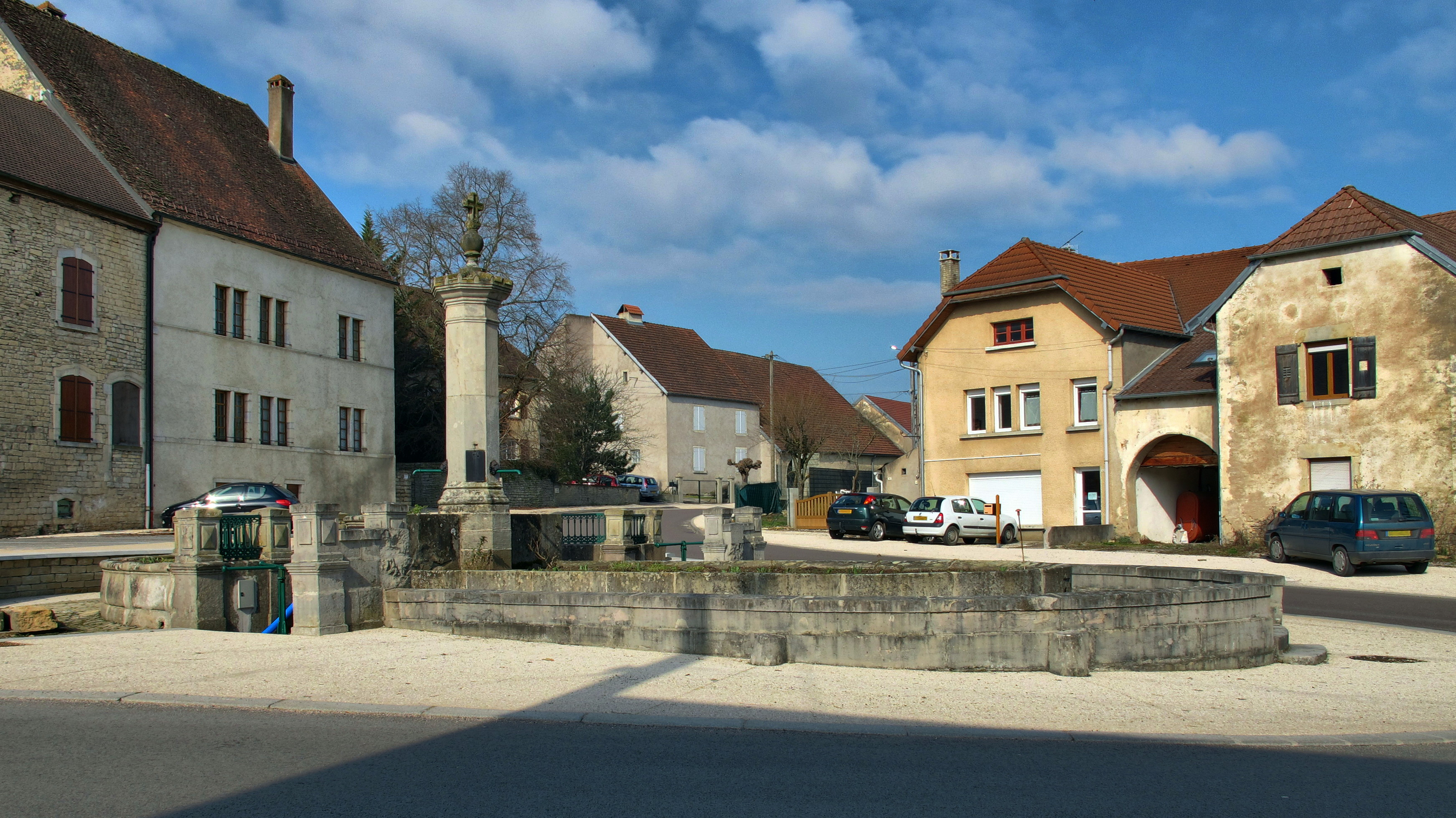 Inscrit aux monuments historiques sous le numéro PA00102151